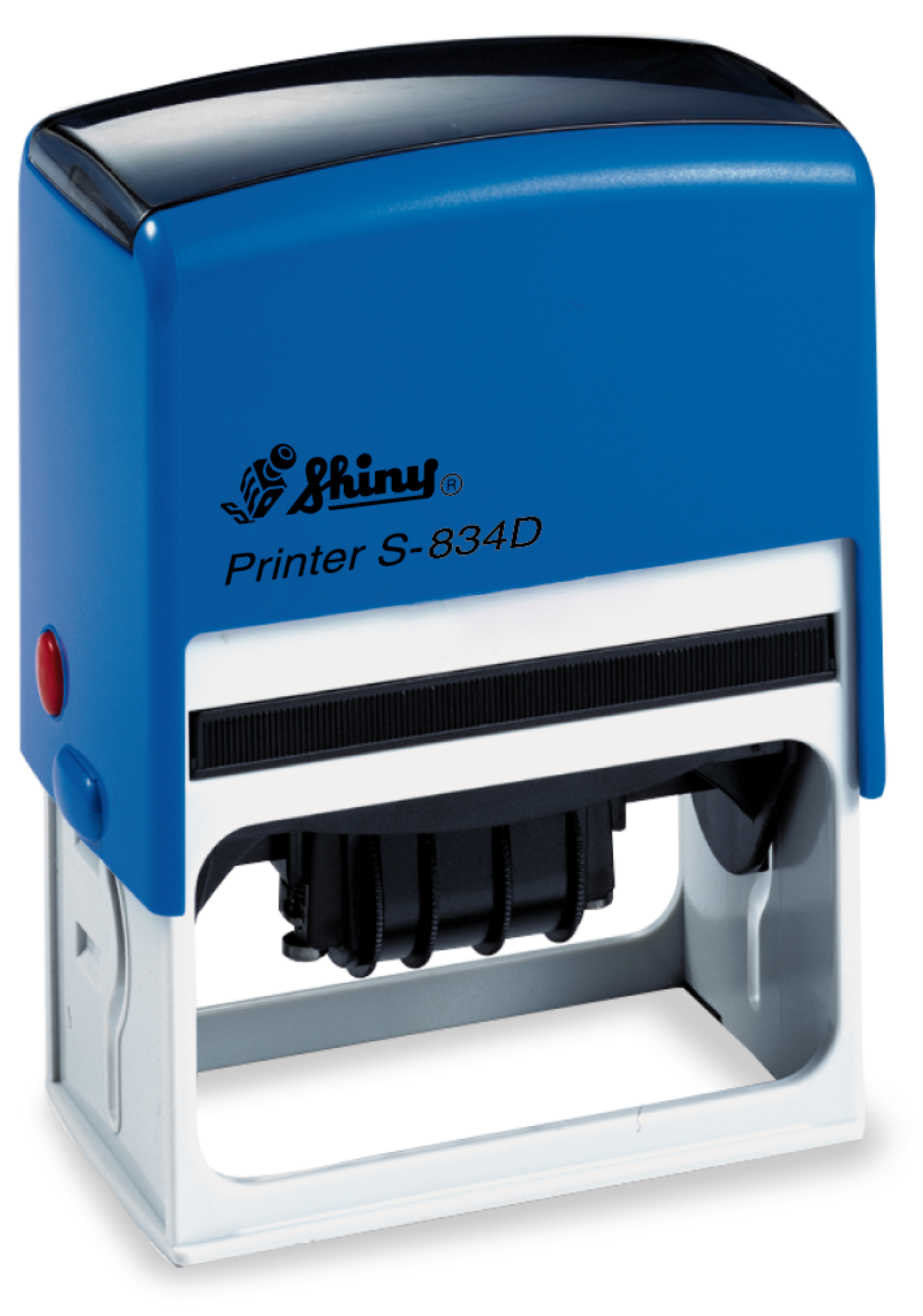 Tampon printer